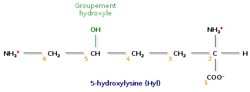 4-hydroxylysine (Hyl).jpg